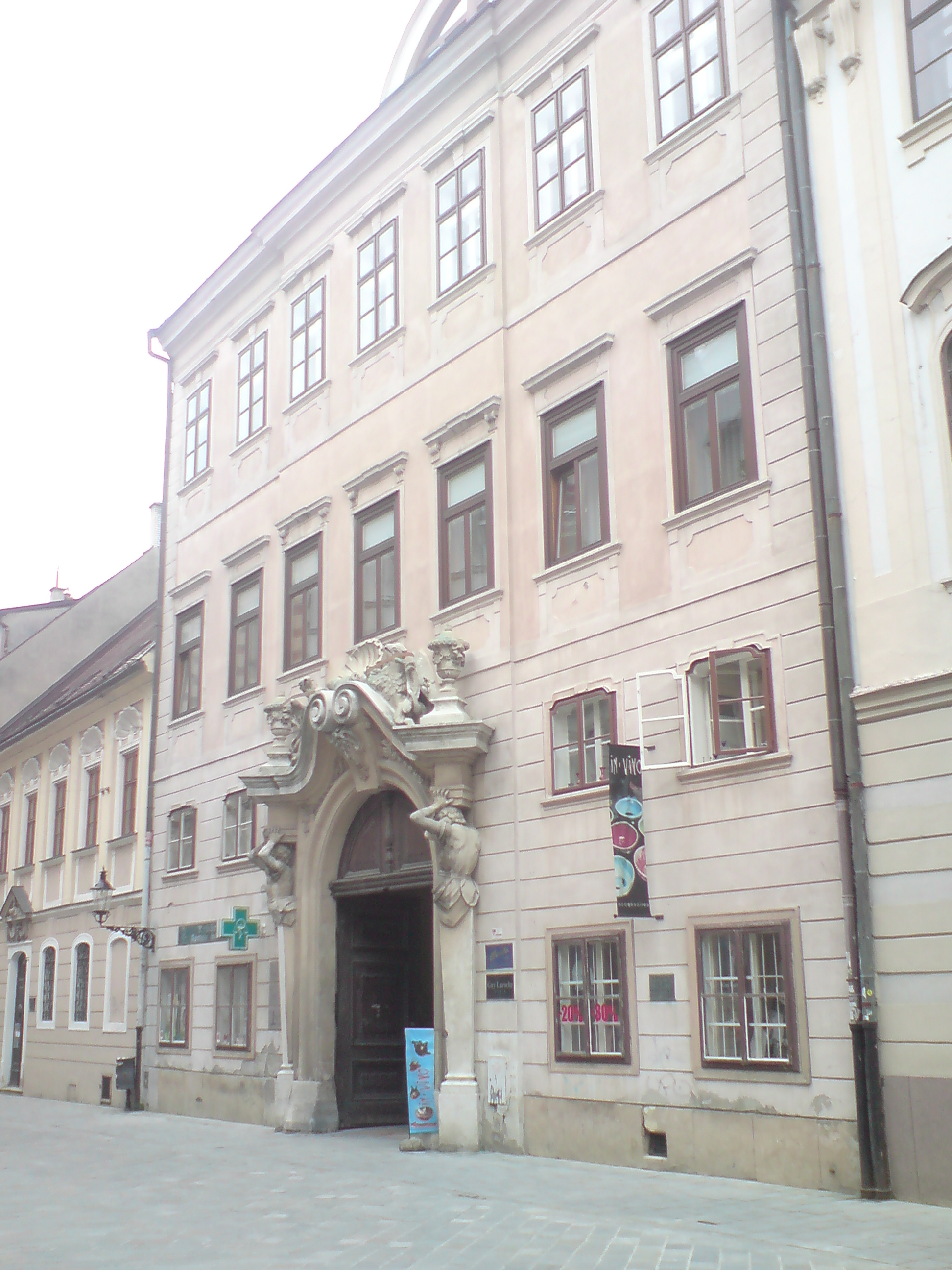 Esterházyho palác, Panská, Bratislava